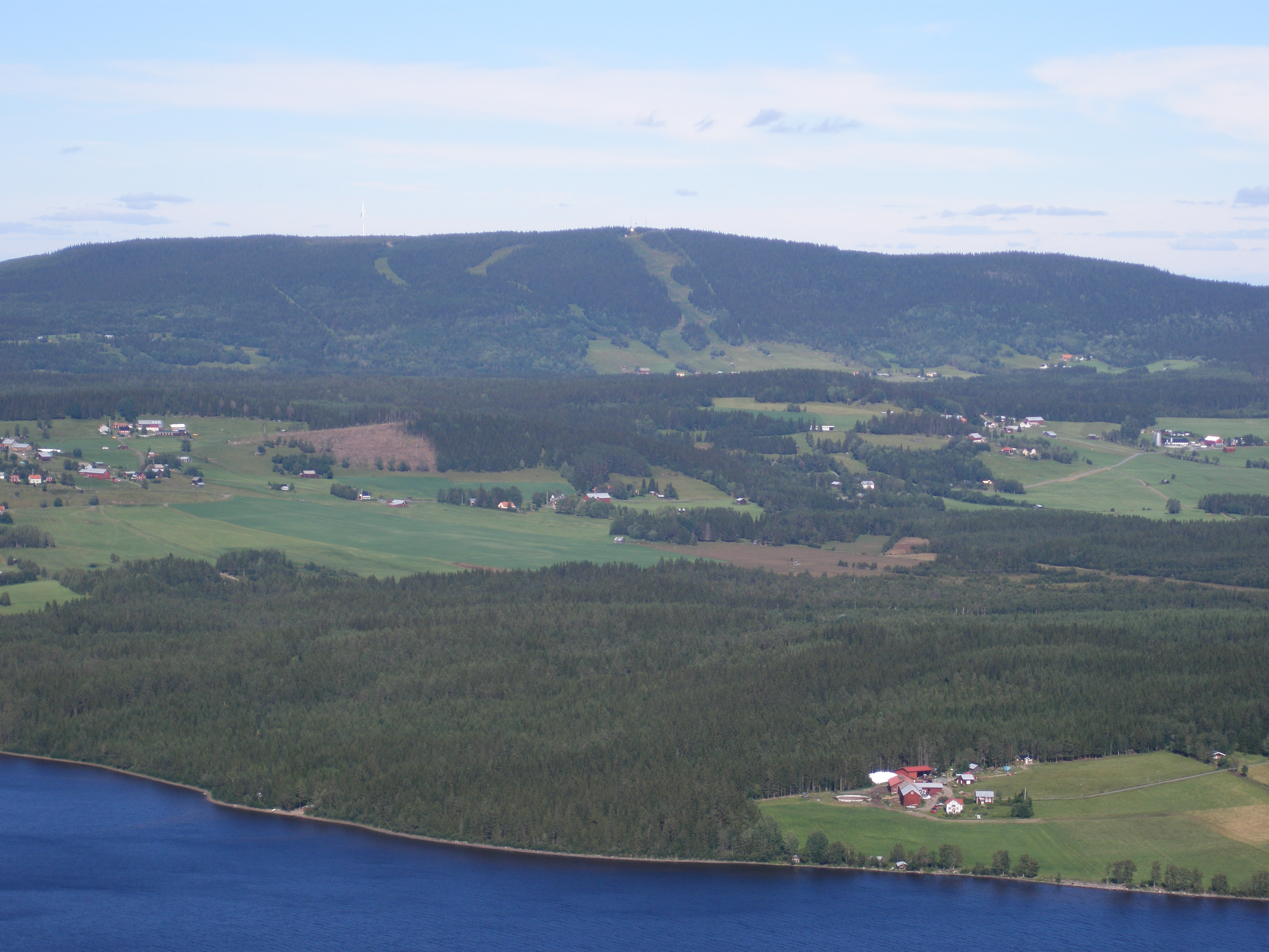 Viken, Bångåsen och Almåsa sett från Hällberget, Offerdal, Jämtlands län, Sverige.